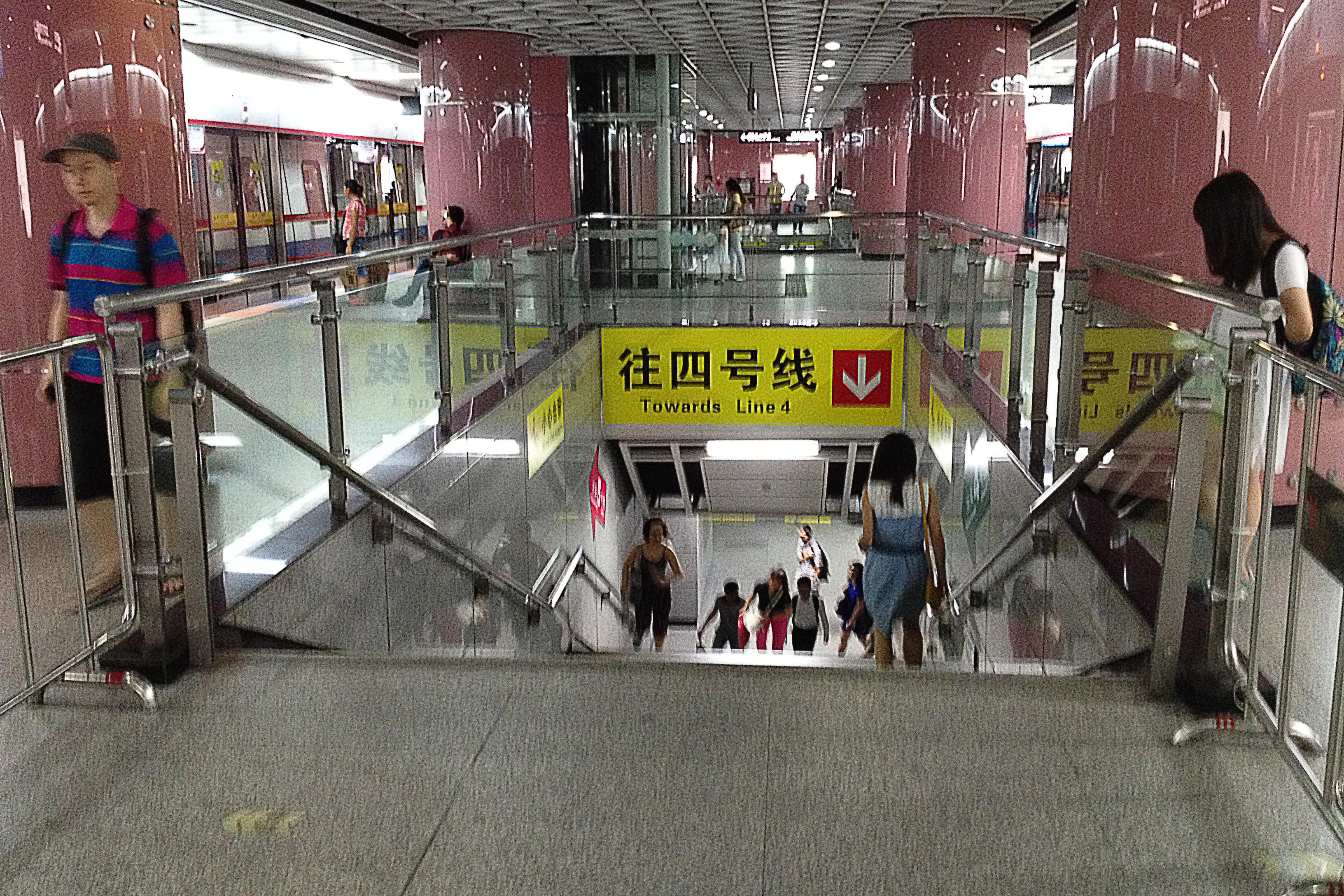 广州地铁车陂南站5号线月台的换乘通道口